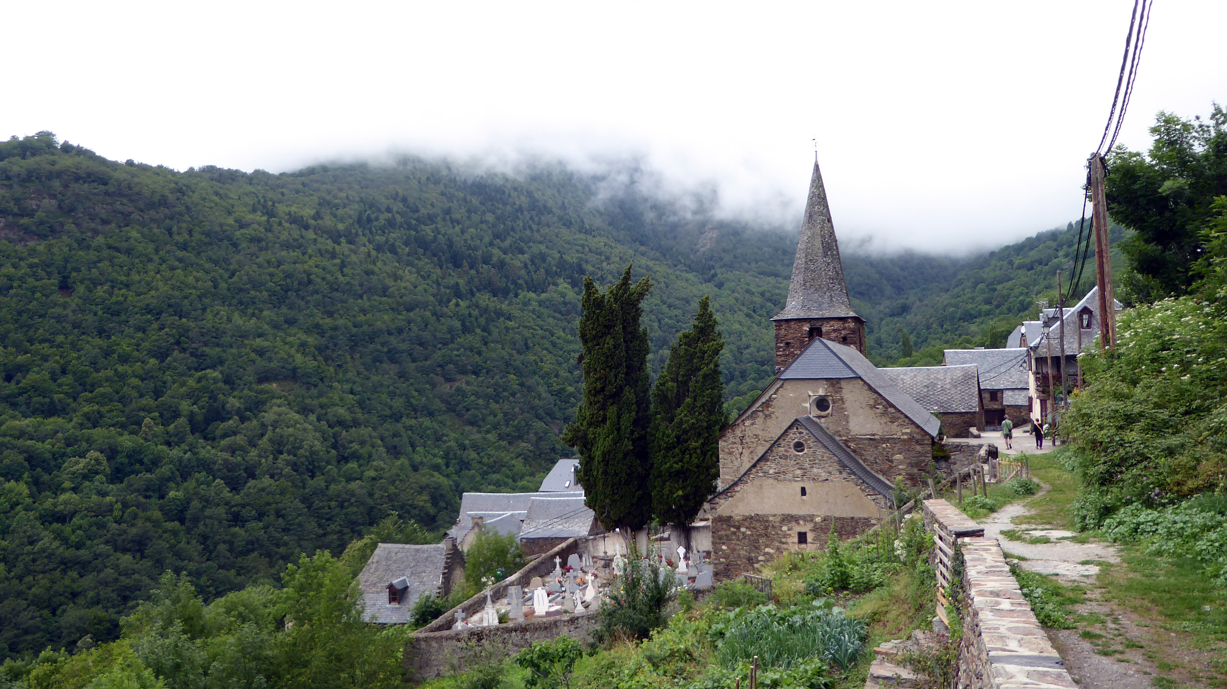 Vista del municipi de Bausen (Vall d'Aran)